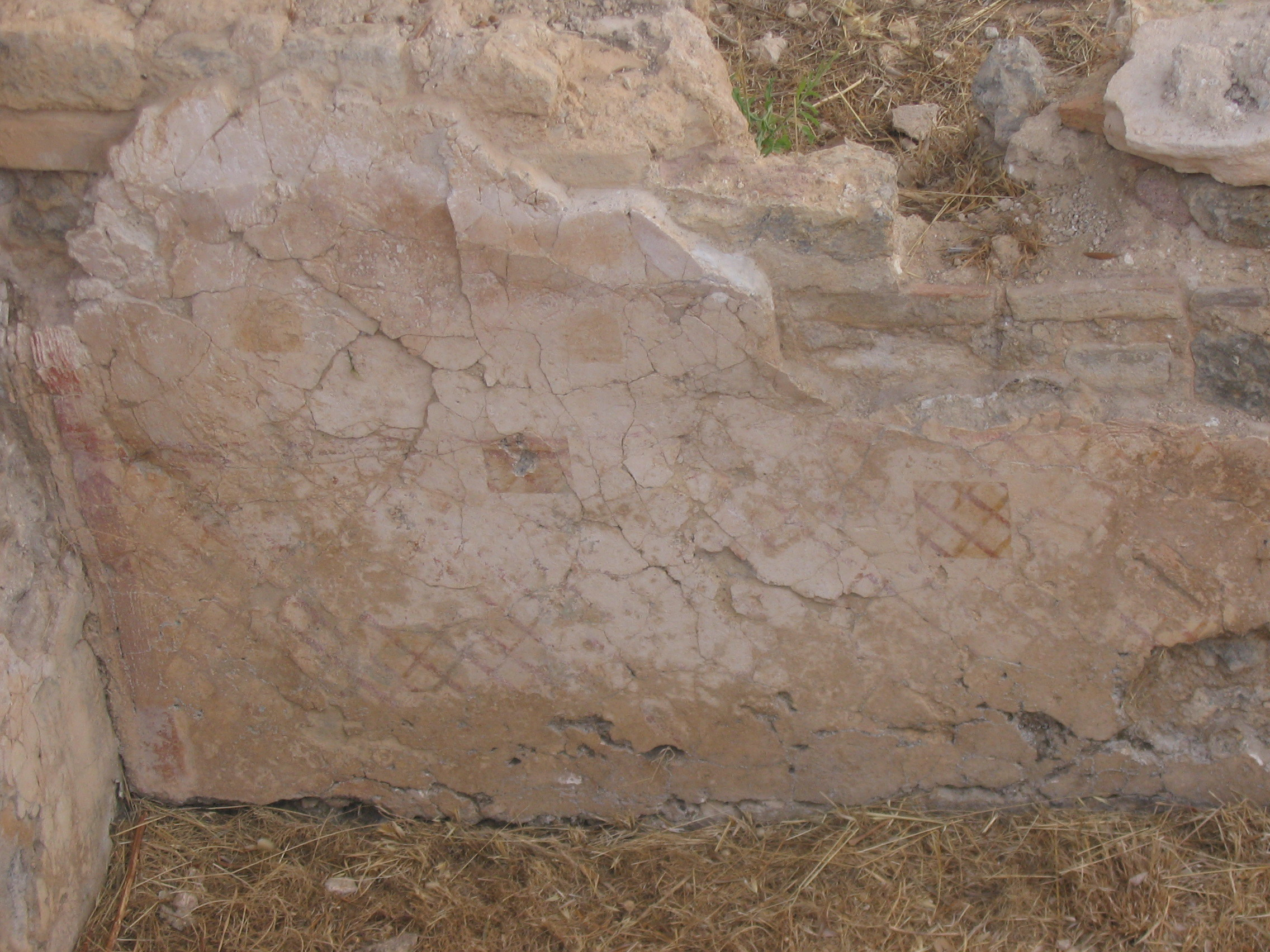 Cosa, Ansedonia, Orbetello, Toscana, Italia